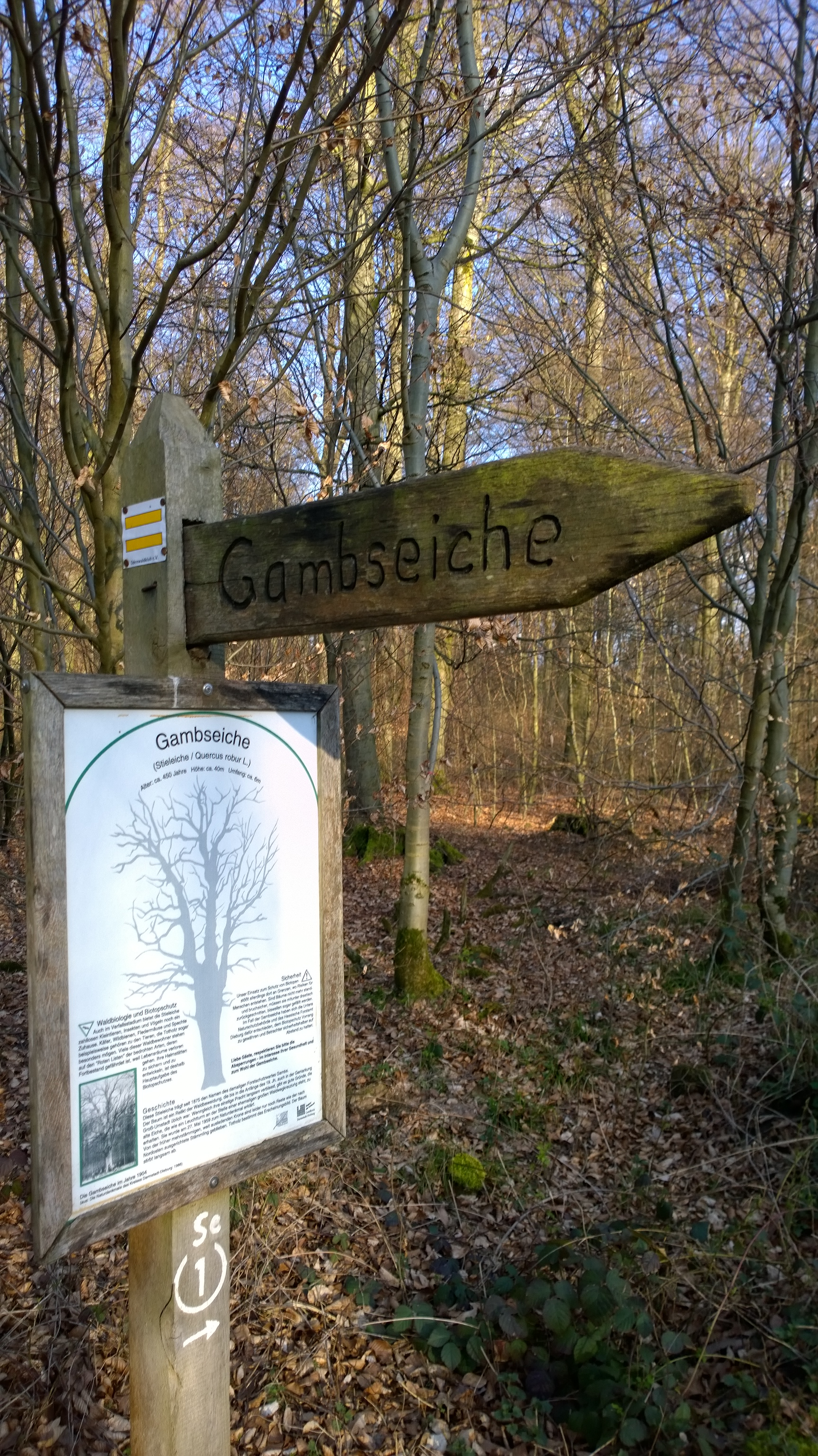 Wegweiser und Beschreibung zur Gambseiche, Naturdenkmal in Groß-Umstadt